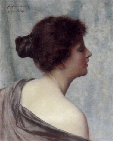 Bildnis einer Frau in schulterfreiem Kleid (Öl auf Leinwand, 40 × 50 cm) von Max Nonnenbruch